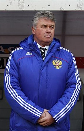 Guus Hiddink, en un partido de la selección de Rusia contra la de Azerbaiyán.